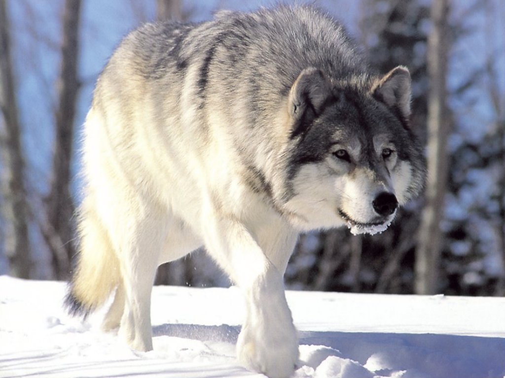 Wolf (dier) (soort is nog gewenst)